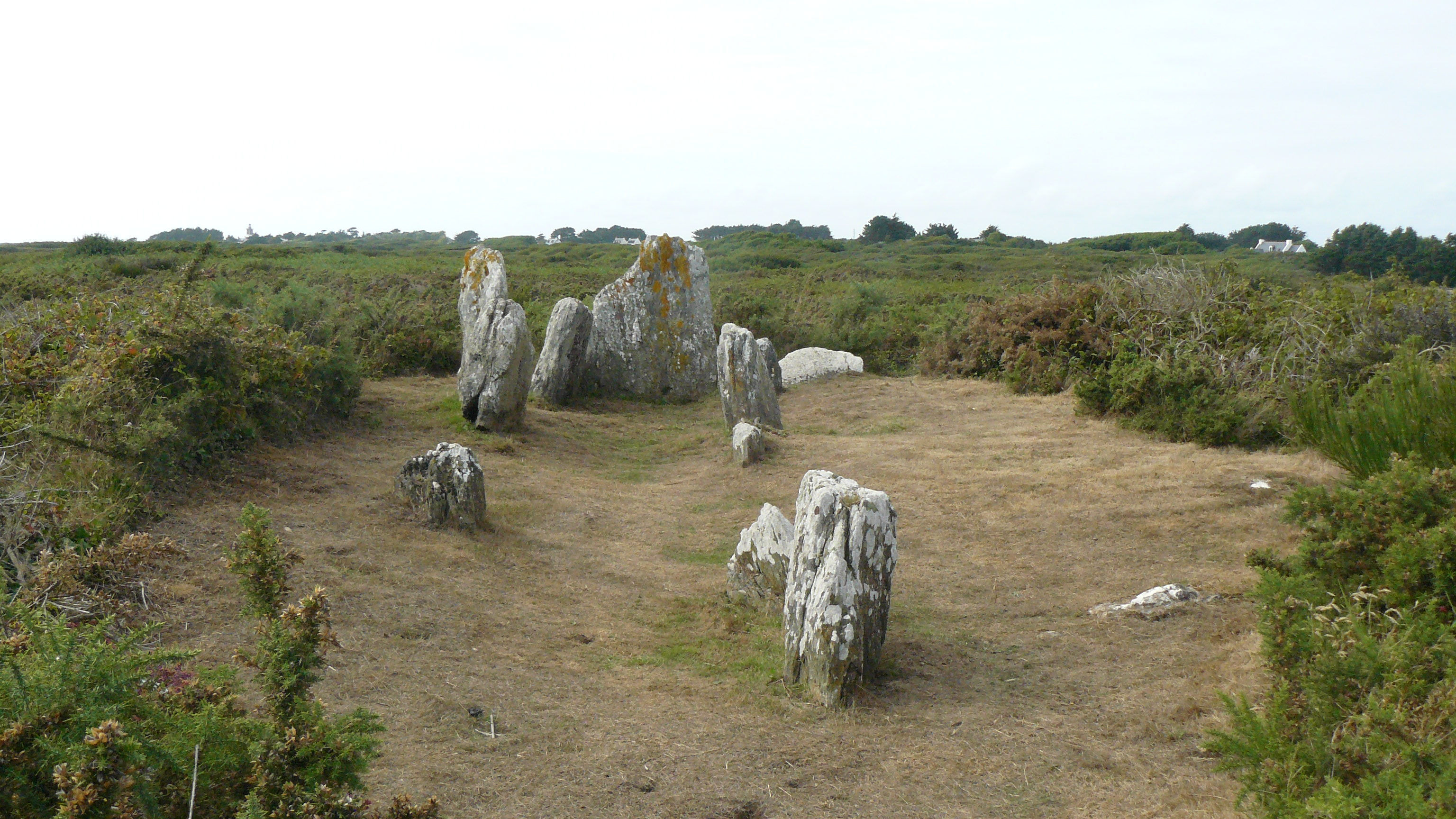 Dolmen Men kam situé près du hameau de Kerlard. Il date du 4e millénaire avant JC D'après l'écomusée.